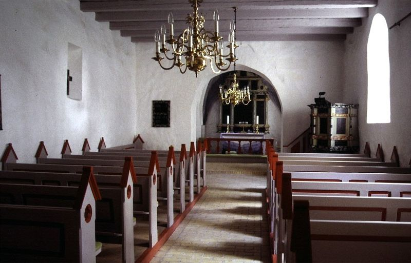 Nørre Kongerslev Kirke i Danmark. Skibet set mod øst